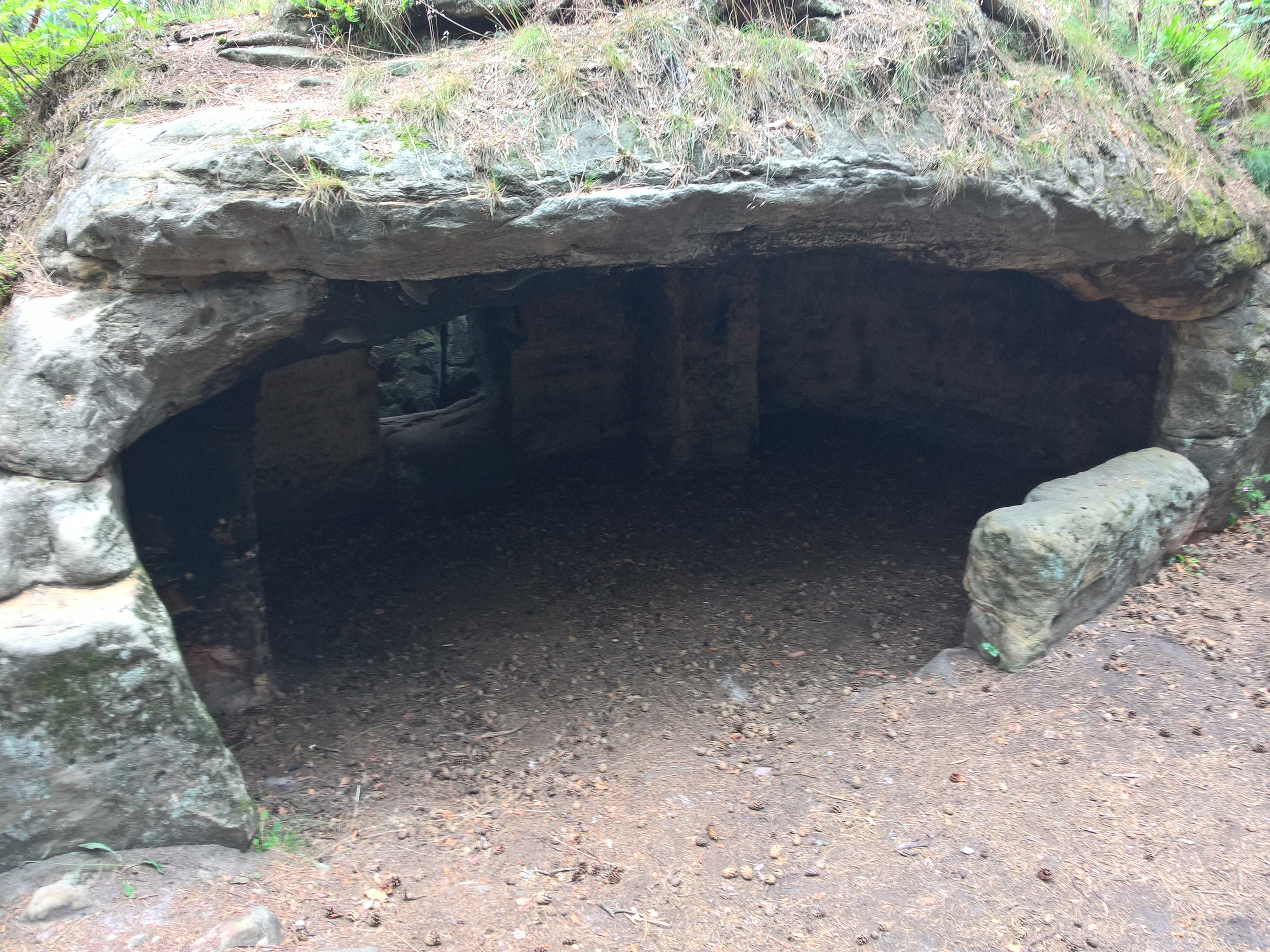 Skalní světničky.